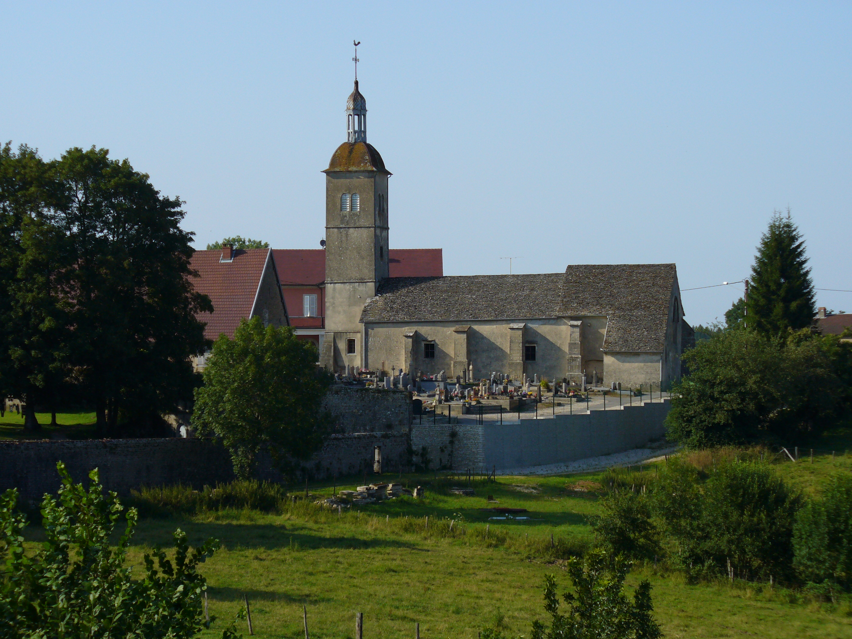 Eglise de Dompierre-sur-Mont (département du Jura, France)